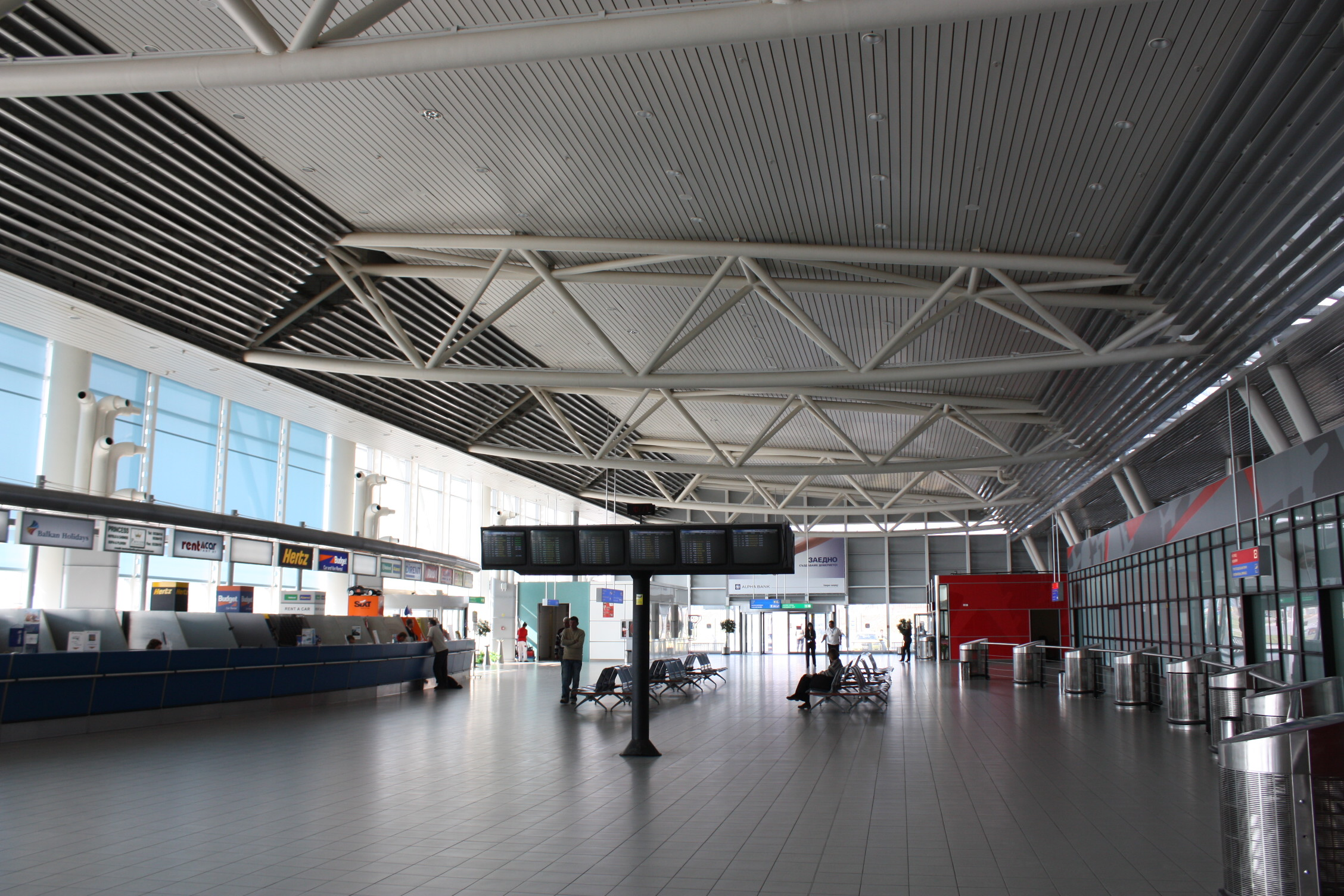 Sofia Airport, Bulgaria